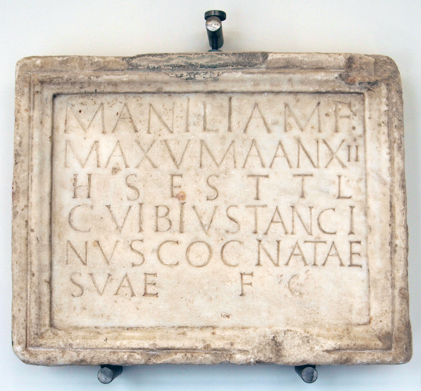 Transcrição/transcripción/transcriptionːMANILIA M(arci) F(ilia) / MAXVMA AN(norum) XII (duodecim) / H(ic) S(ita) E(st) S(it) T(ibi) T(erra) L(evis) / C(aius) VIBIVS TANC/NVS COCNATAE / SVAE F(aciendum) C(uravit). (CIL II 119)